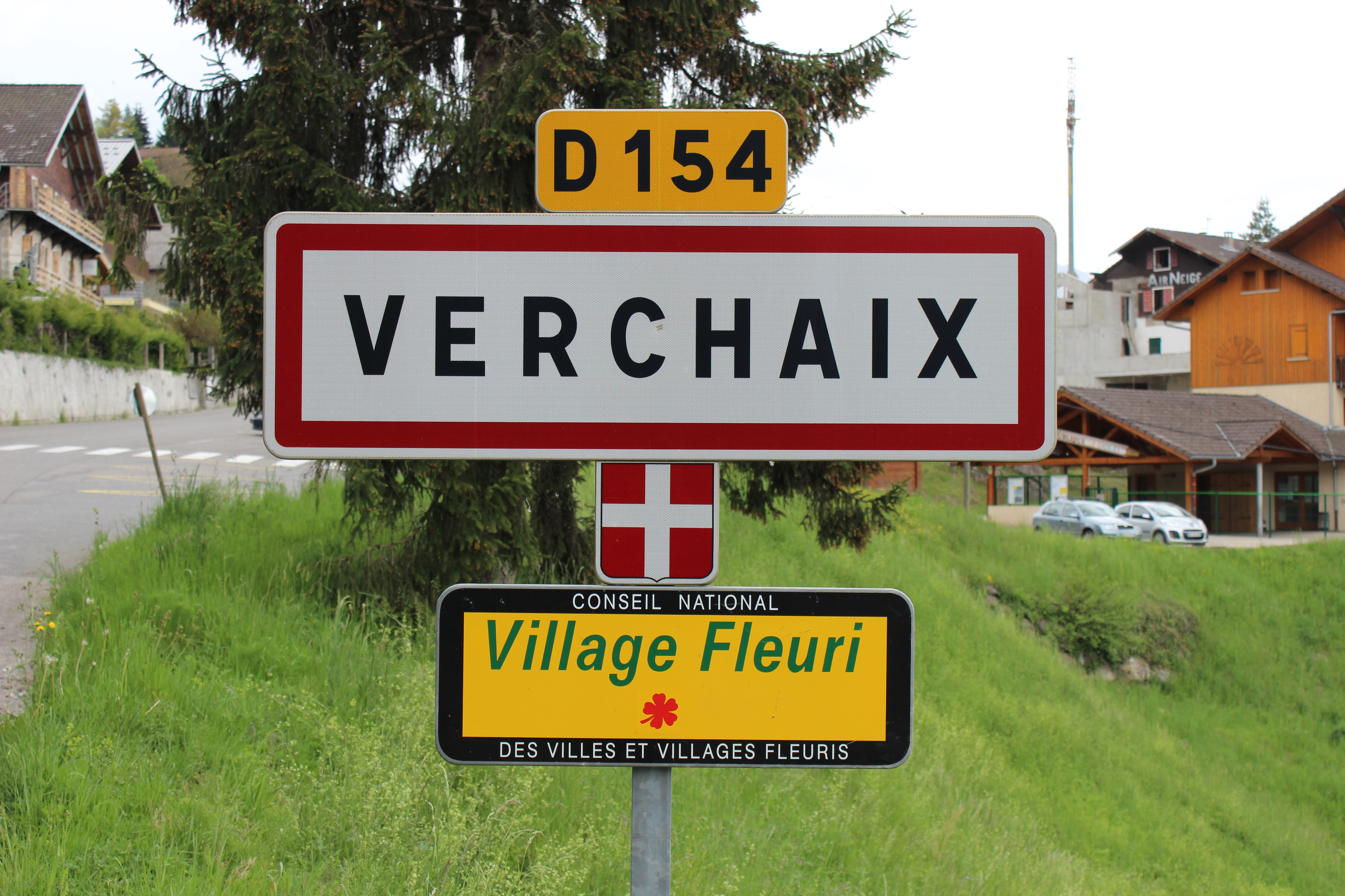 Panneau d'entrée dans la commune de Verchaix.